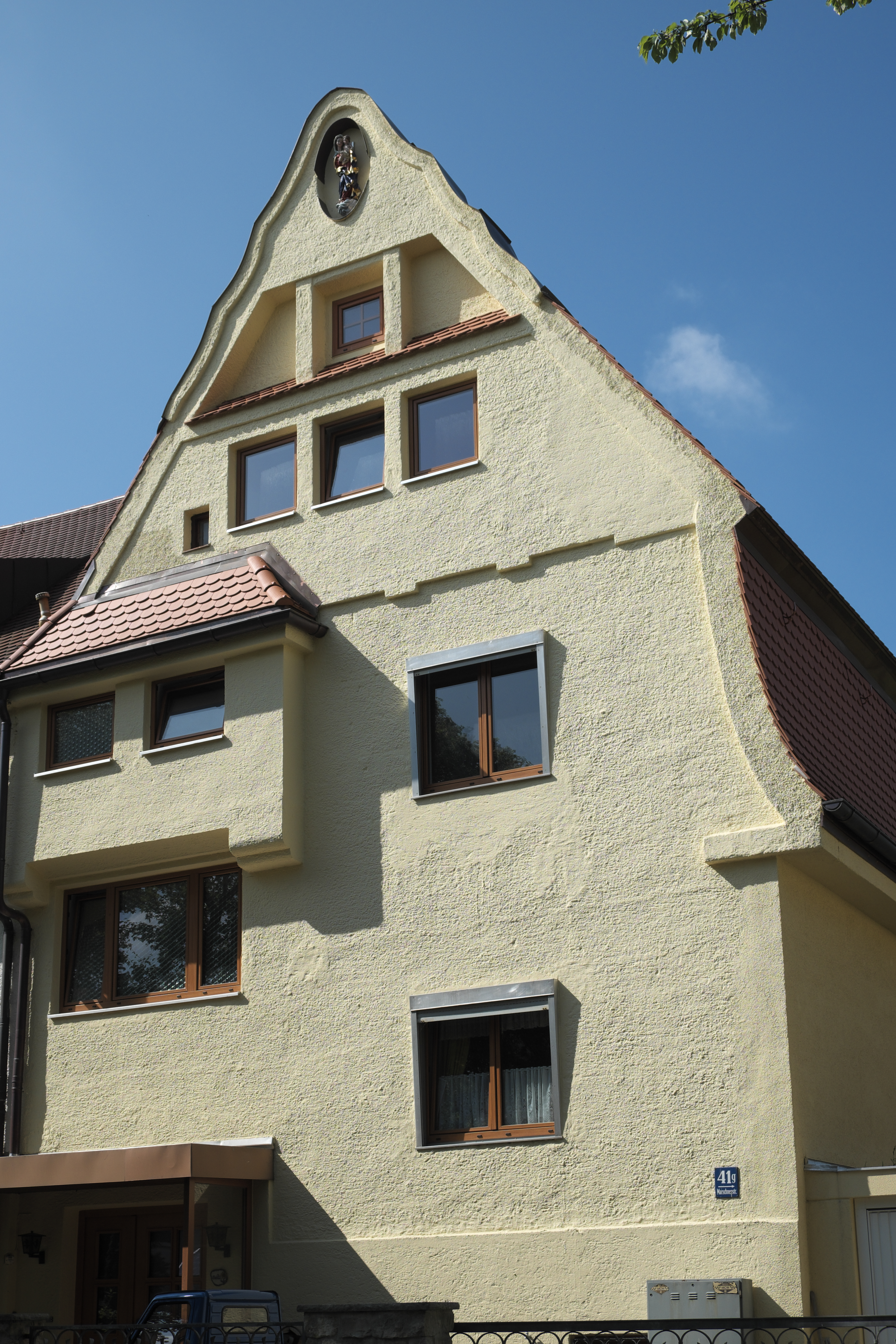 Wohnhaus in der Marschnerstraße 41g in Pasing im Stadtbezirk Pasing-Obermenzing in München (Bayern/Deutschland)